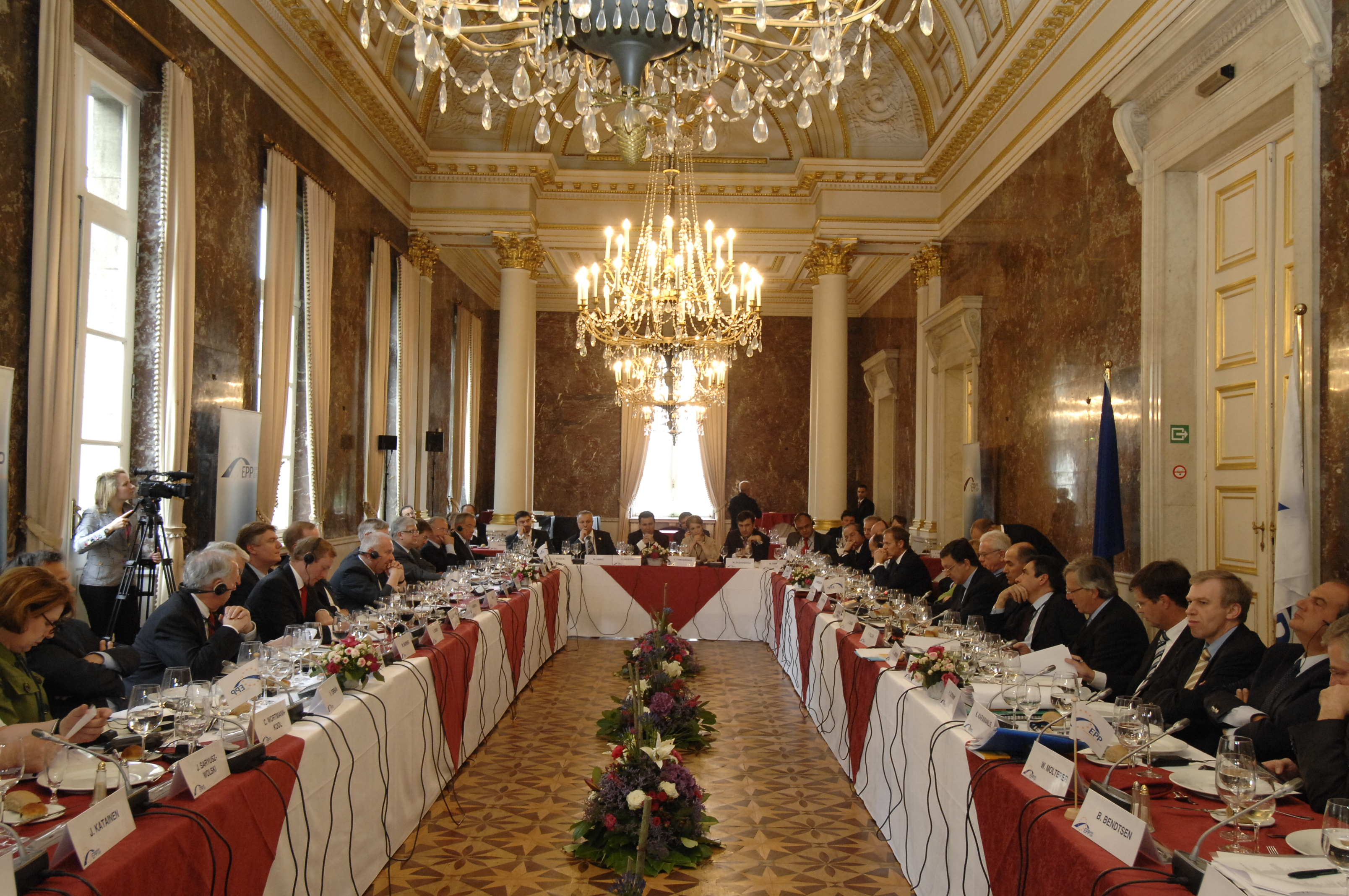 EPP Summit 19 June 2008